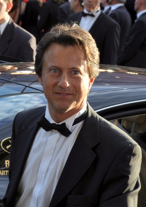 Vincent Perrot au festival de Cannes.